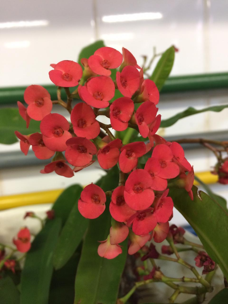 Essa imagem trata-se de uma espécie da família Euphorbiaceae, em que pode se observar a sua flor. É popularmente conhecida como coroa-de-cristo